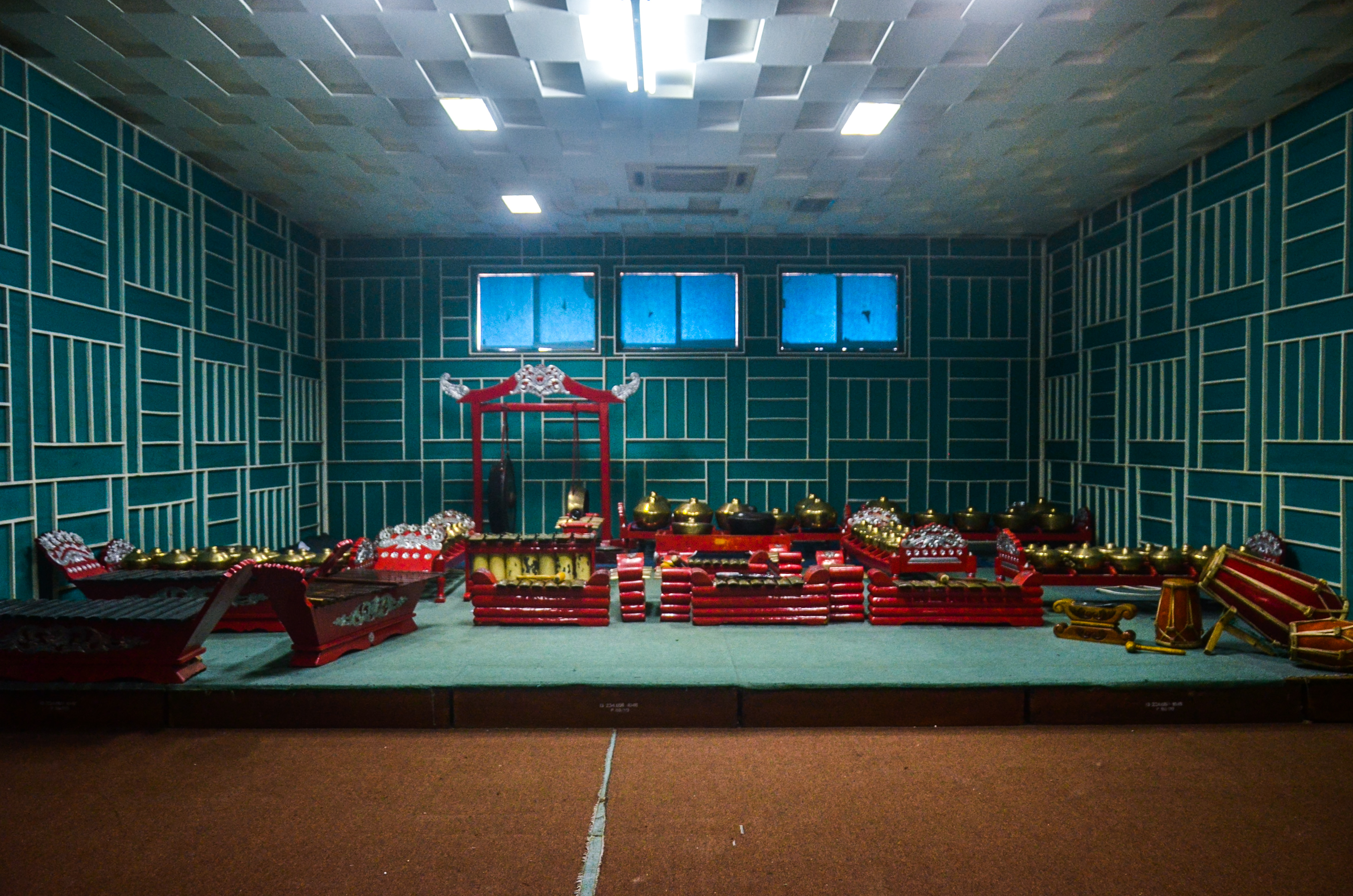 Gamelan Pelog Salendro ini merupakan koleksi Jurusan Karawitan ISBI Bandung. Foto ini termasuk ke dalam program hibah WikiWaditra yang merupakan kerja sama antara Wikimedia dengan Jurusan Karawitan ISBI Bandung.